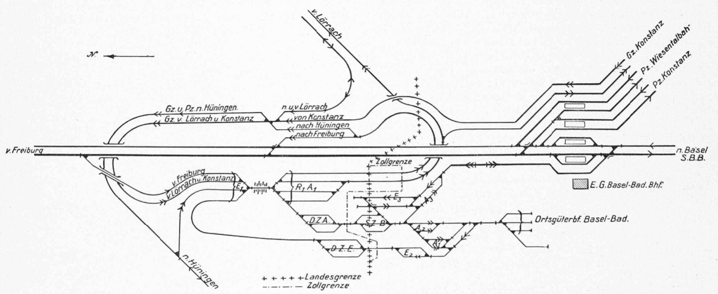 Gleisscheme des neuen Badischen Bahnhofs (1914)